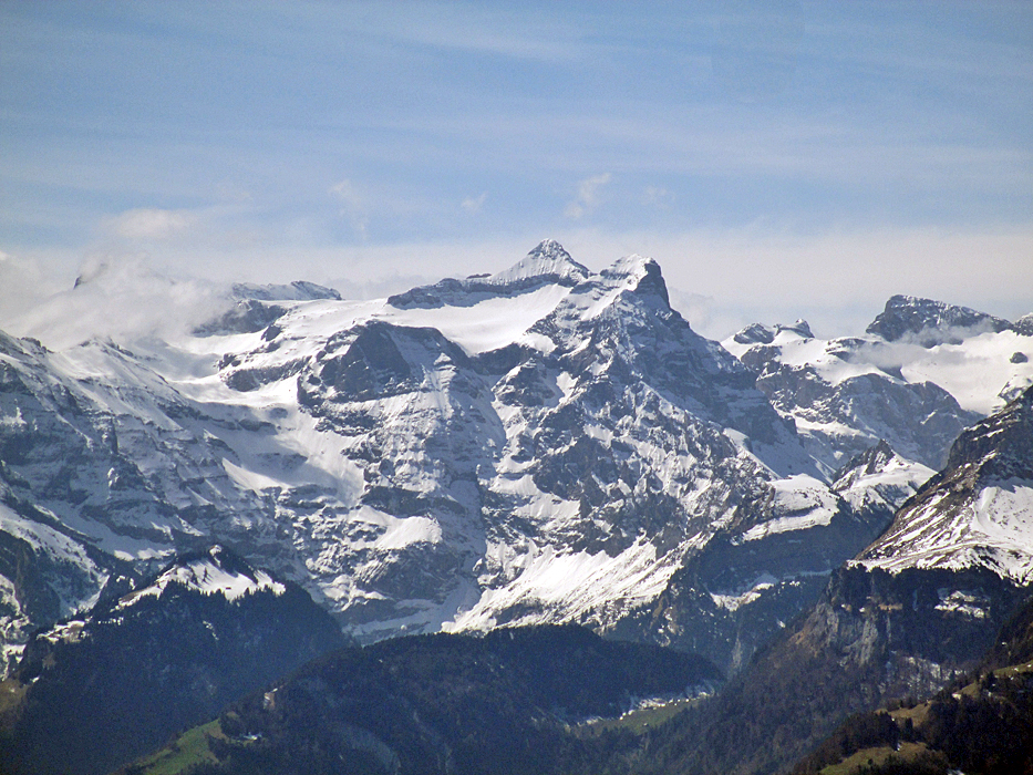 Urirotstock, Ansicht von Nord